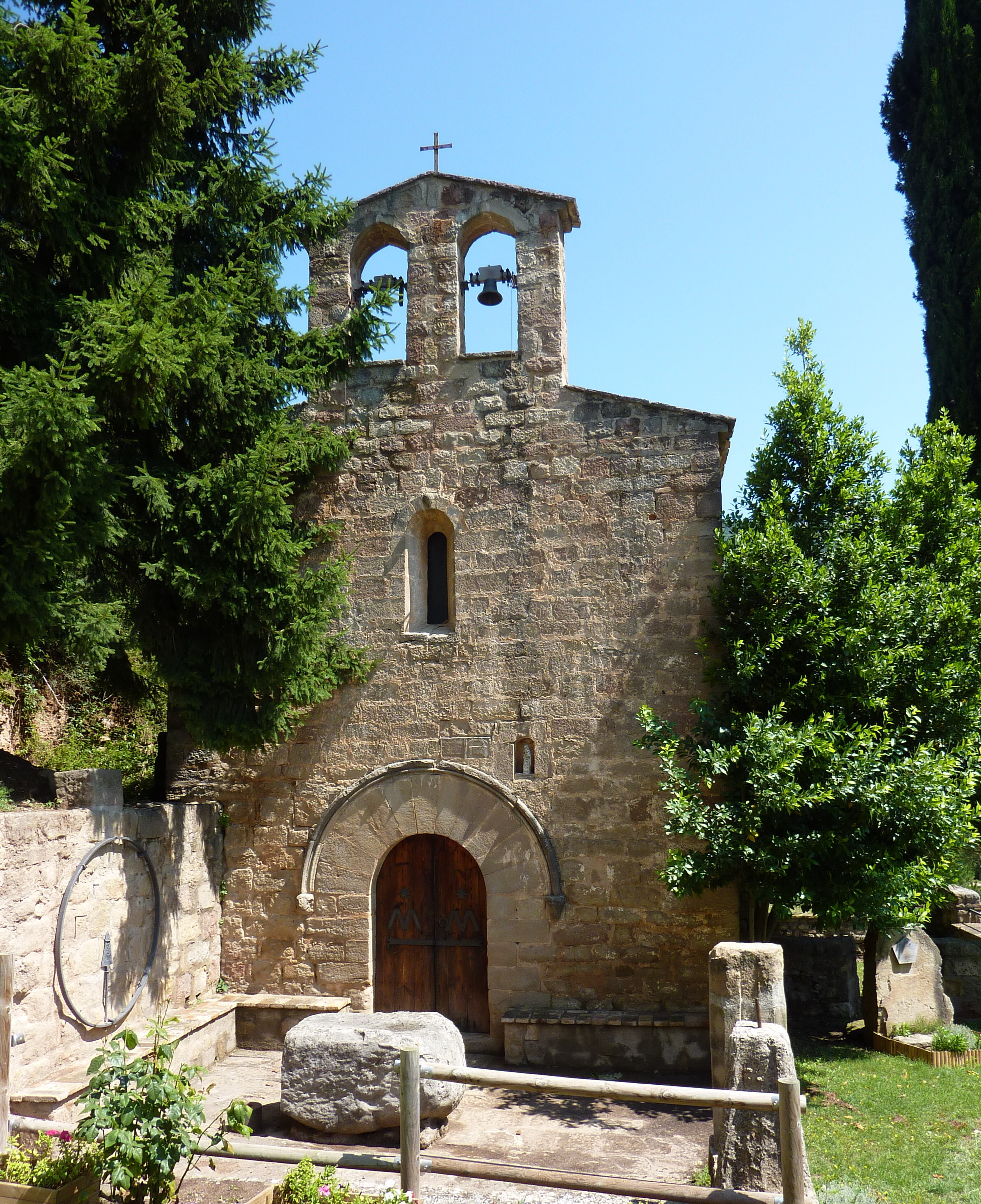 Església de Santa Maria de Valldaura (Olvan)